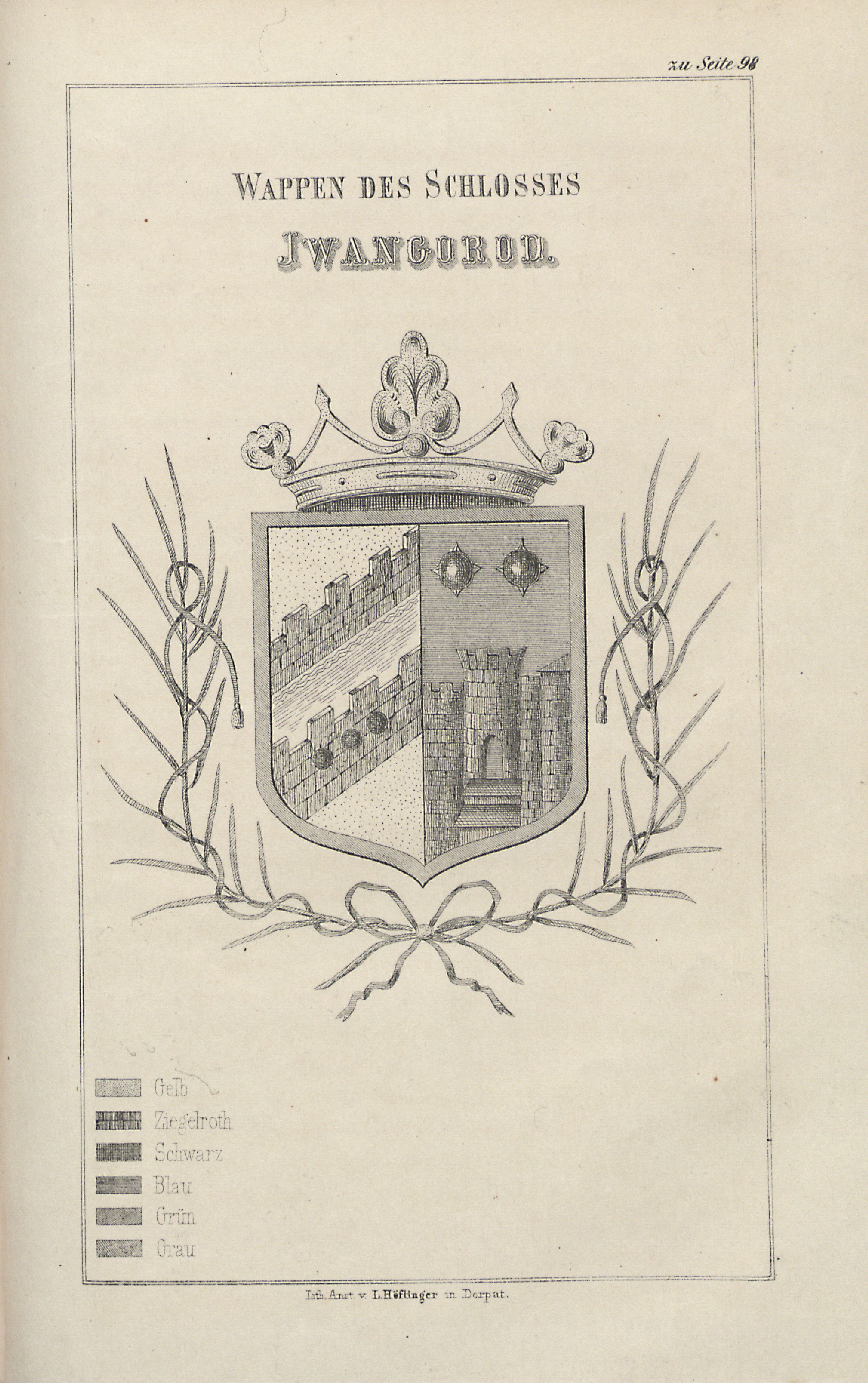 Jaanilinna vapp 17. sajandist